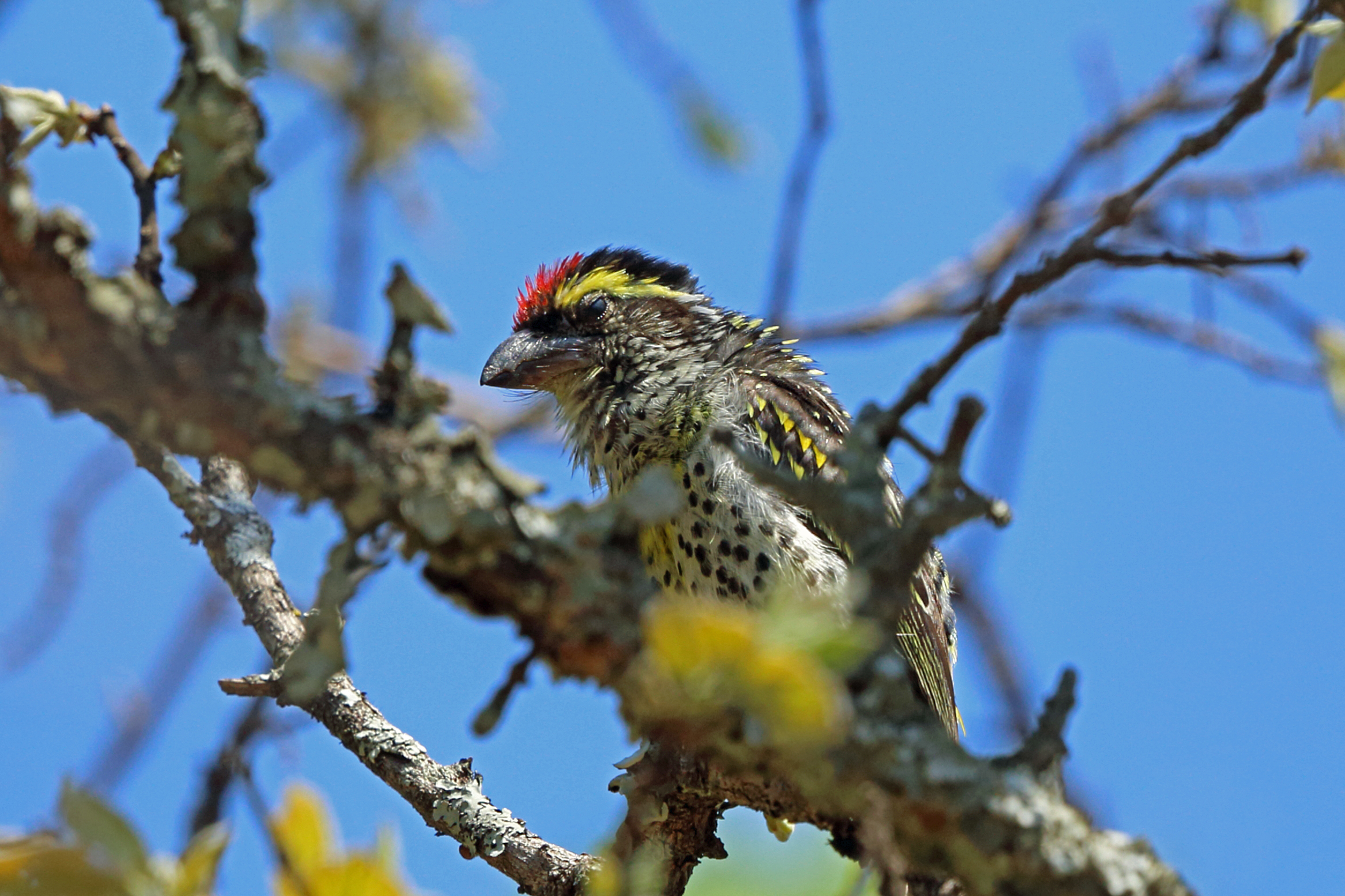 Miombo Pied Barbet, Sakania, DRC